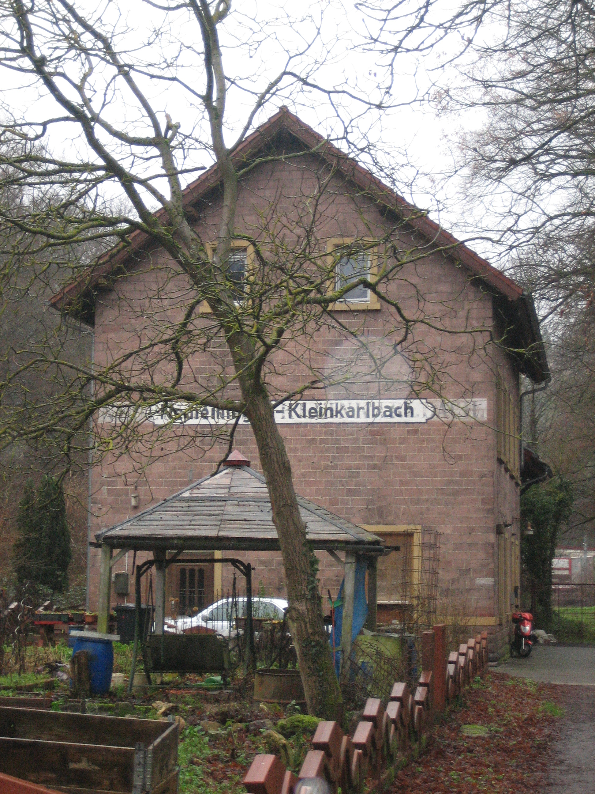 Früherer Bahnhof Neuleiningen-Kleinkarlbach Anfang 2016